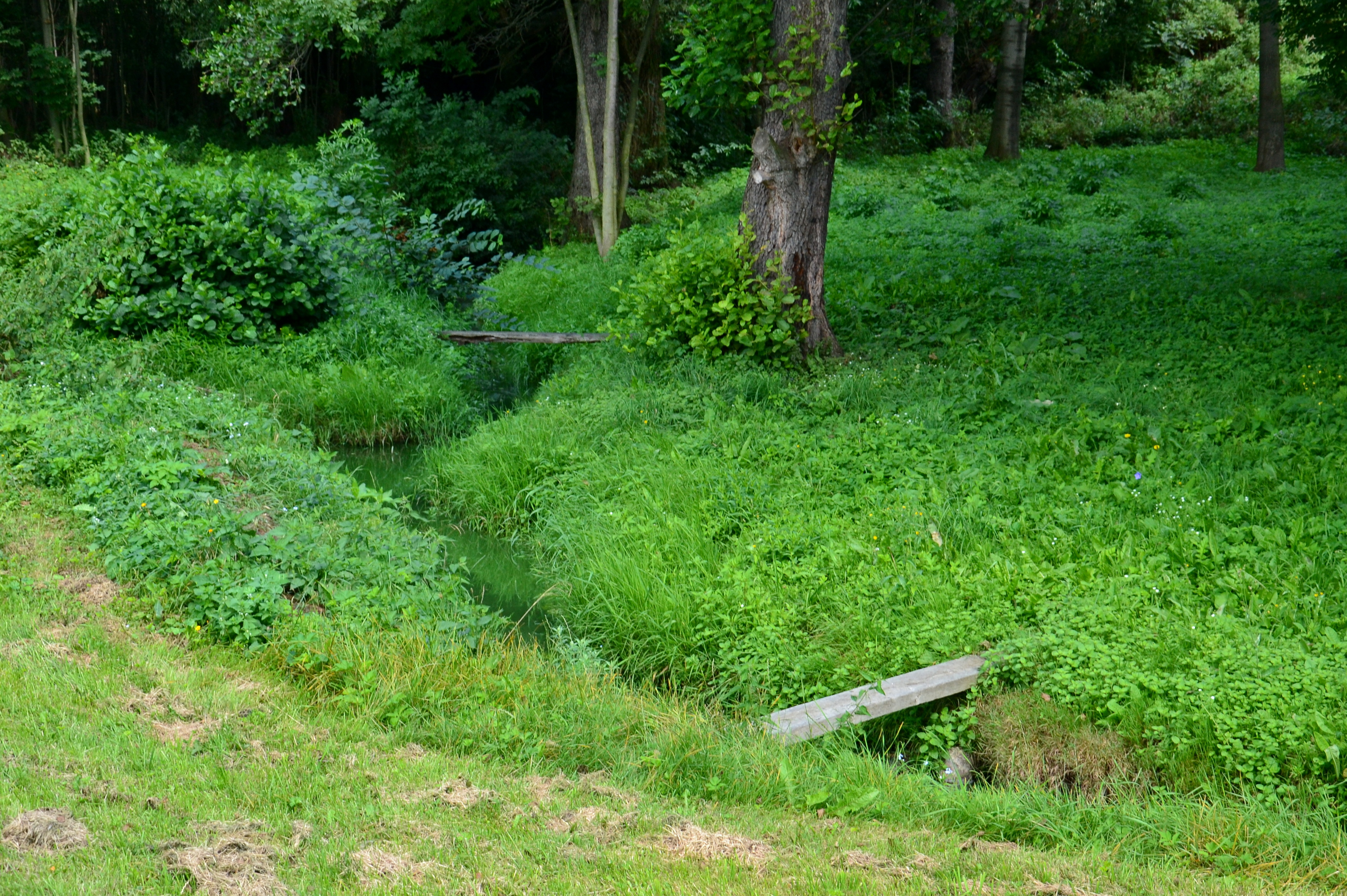 Vidolice - Vintířovský potok v osadě